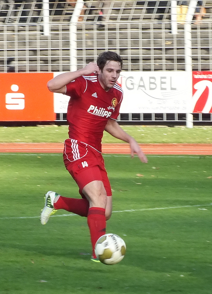 Oerterer erzielt ein Tor im Spiel gegen die SG Wattenscheid 09.